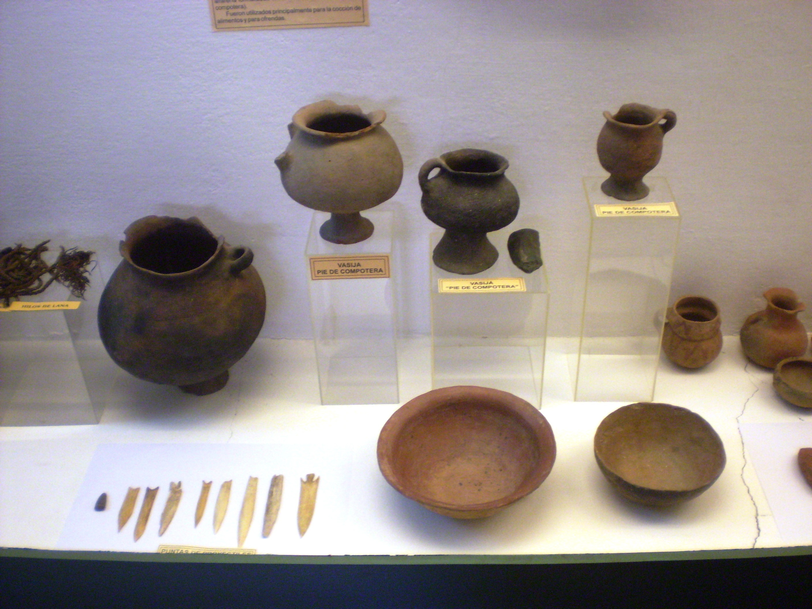 .Museo Arquelógico Don Pío Pablo Díaz de la ciudad de Cachi (Salta),Argentina.